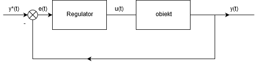 pętla sprzężenia zwrotnego w układzie UAR